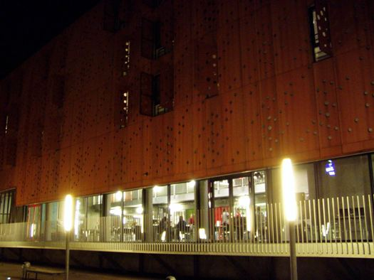 Højskolen Performers House Silkeborg 2009 aftenbillede fra torvet